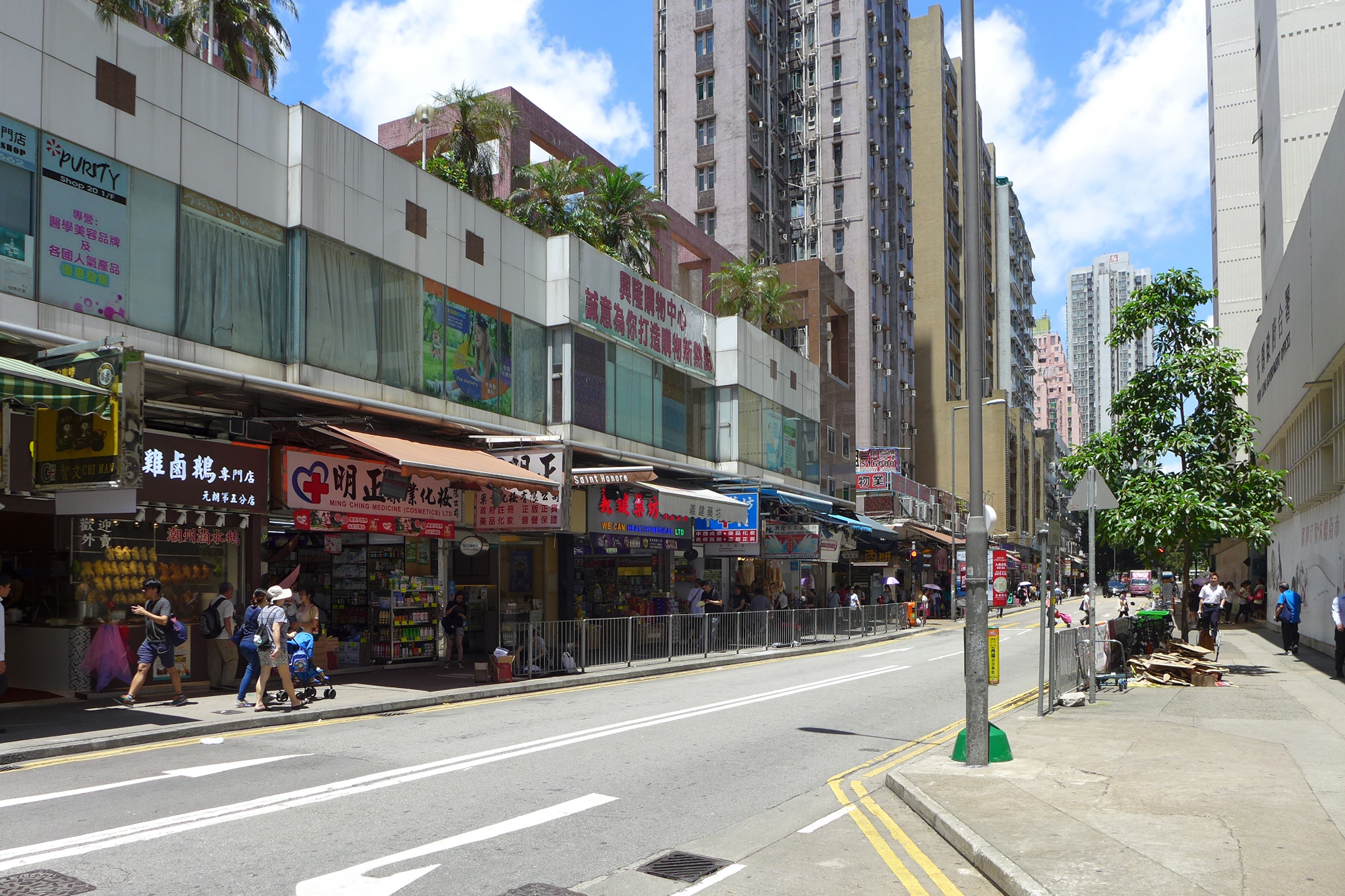 Sau Fu Street